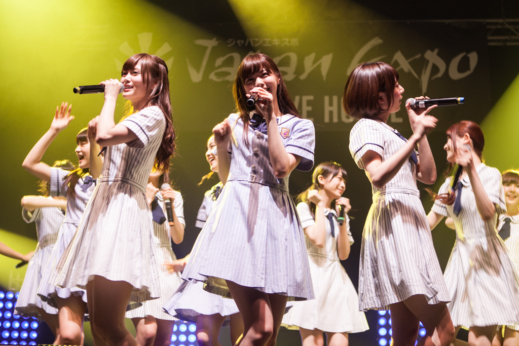 Nogizaka46